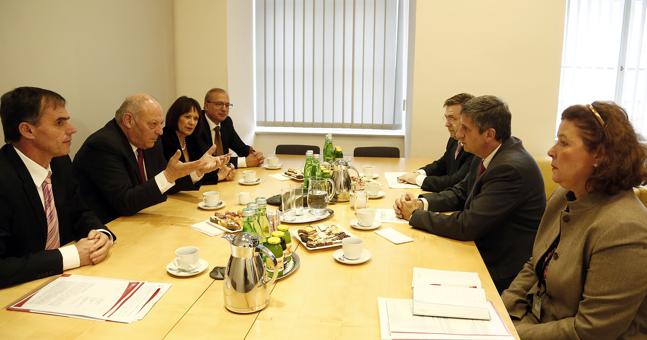 Wien, 30.11.2012 Außenminister Michael Spindelegger trifft den Landeshauptmann von Südtirol Luis Durnwalder.